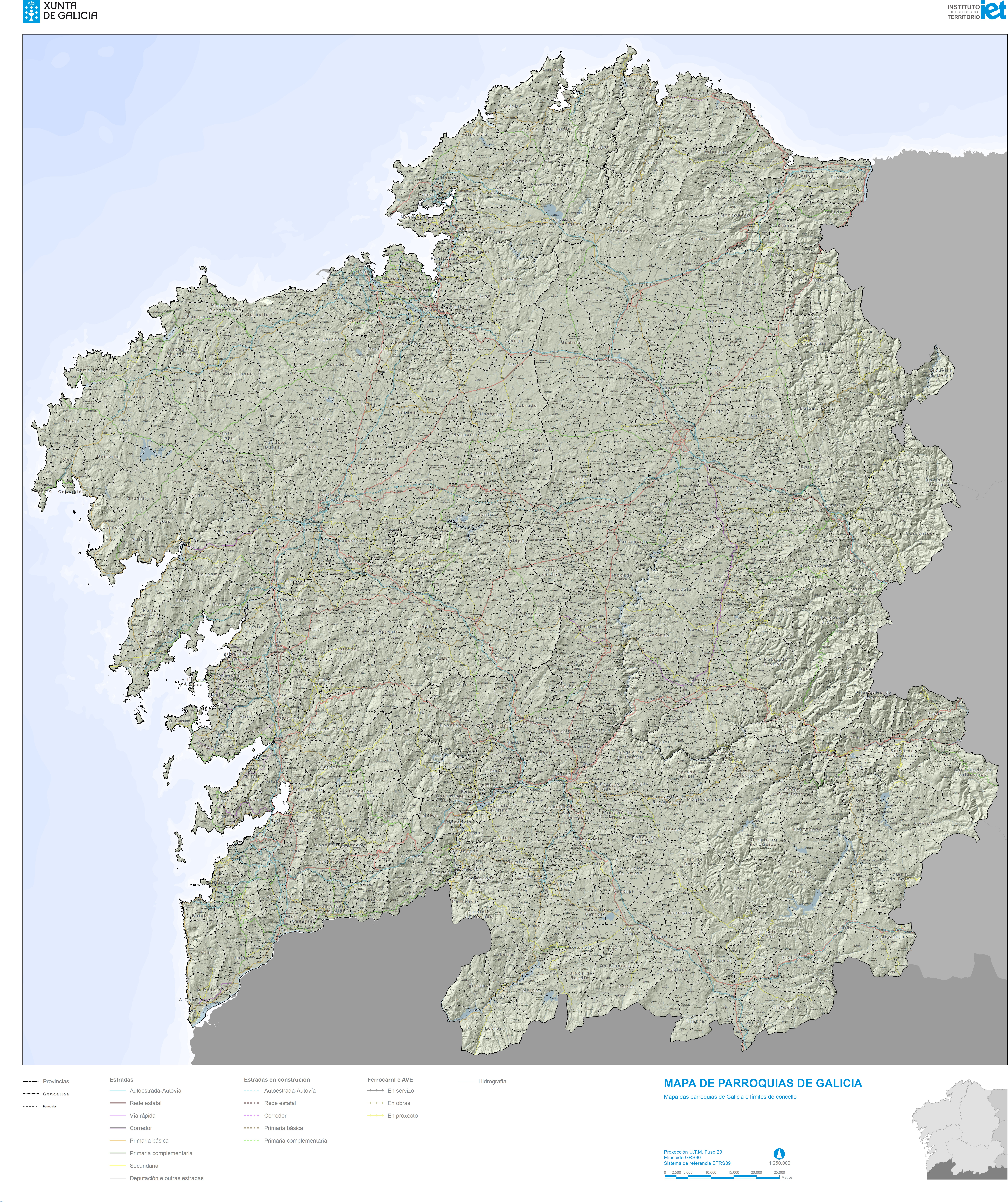 Mapa de parroquias de GaliciaMapa das parroquias de Galicia e límites de concelloProxección U.T.M. Fuso 29Elipsoide GRS80Sistema de referencia ETRS891:250.000